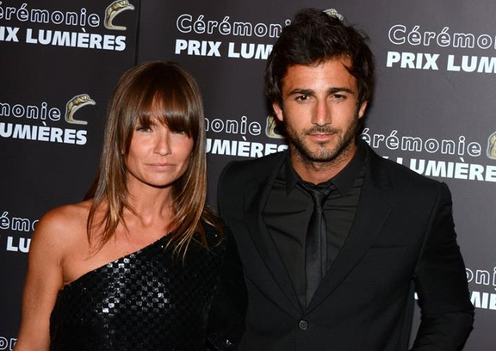 Axelle Laffont et Cyril Paglin à la cérémonie des prix Lumières 2014